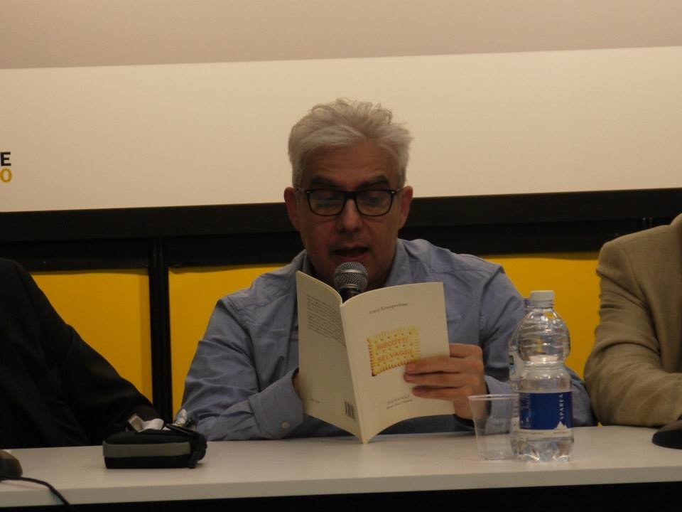 Franz Krauspenhaar Salone del Libro Torino 2013